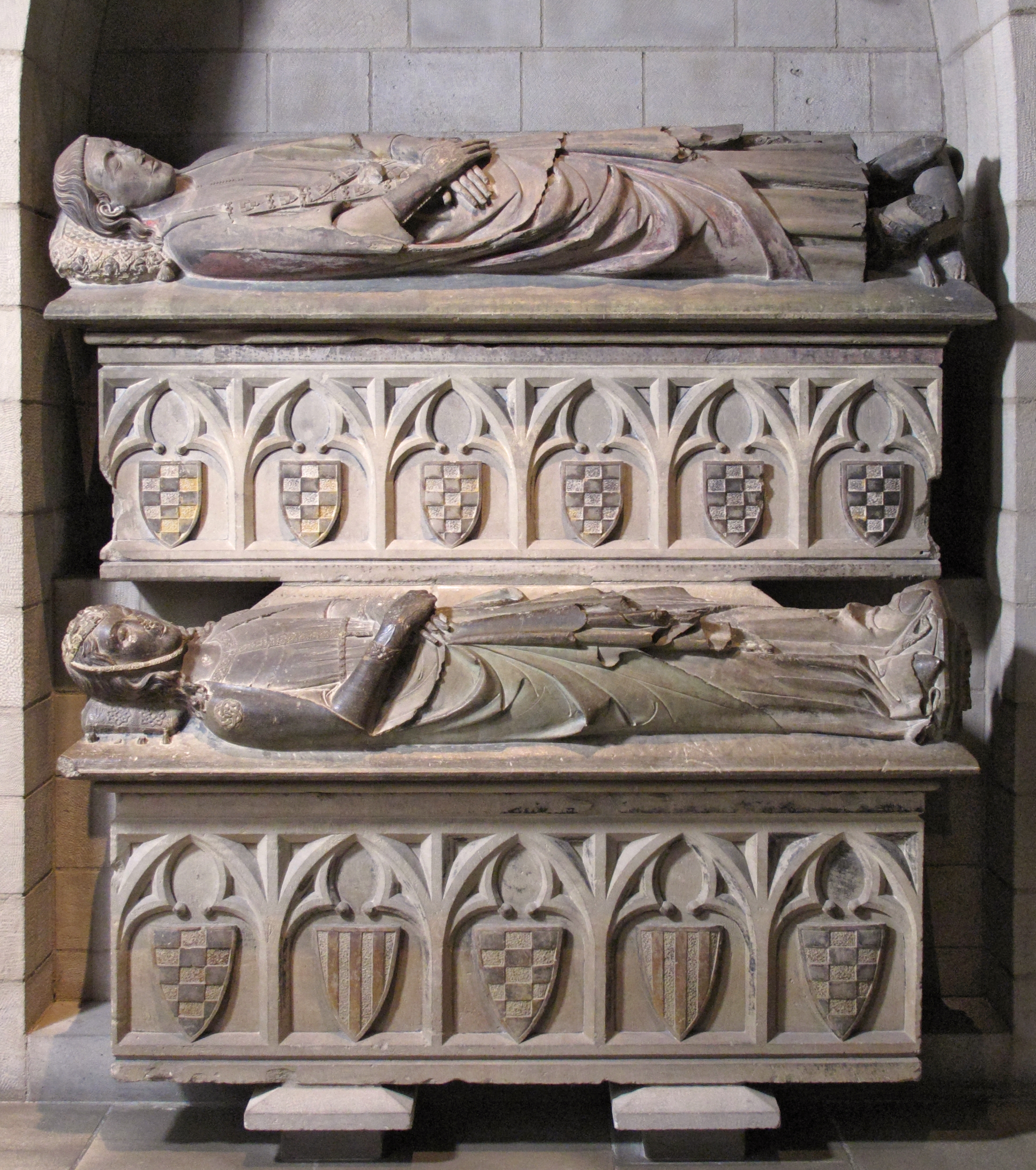 Catalan; Tomb; Sculpture